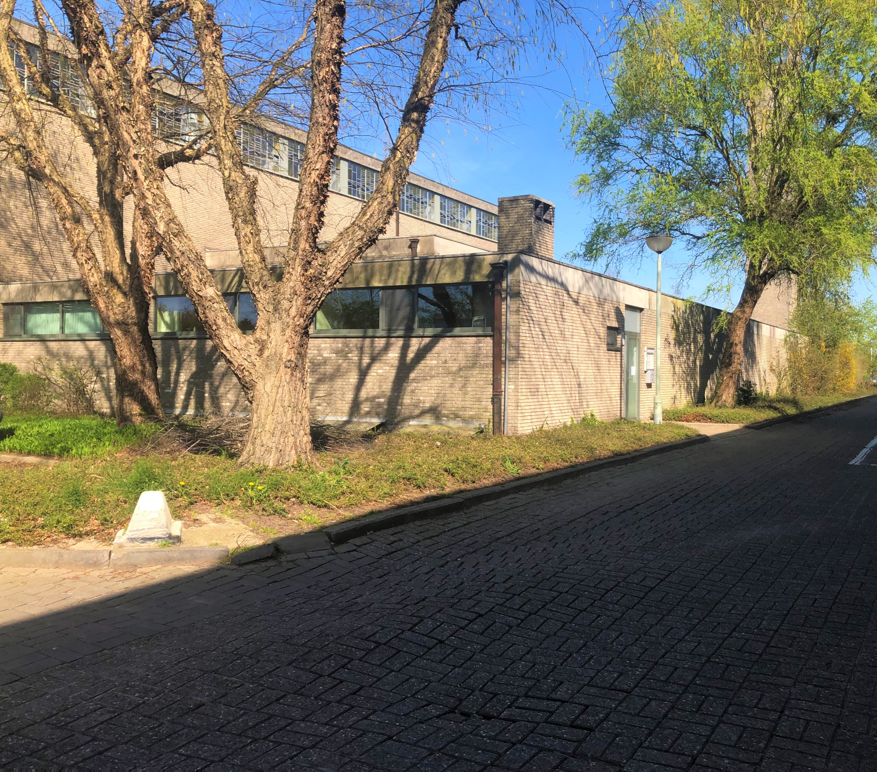 De weekkapel